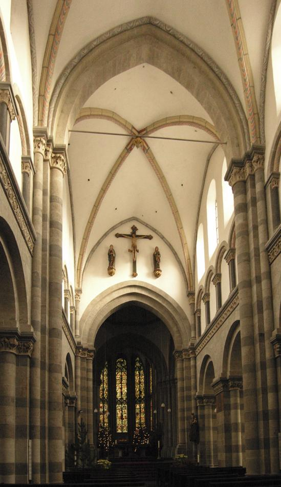 Köln, St. Andreas, Innenansicht